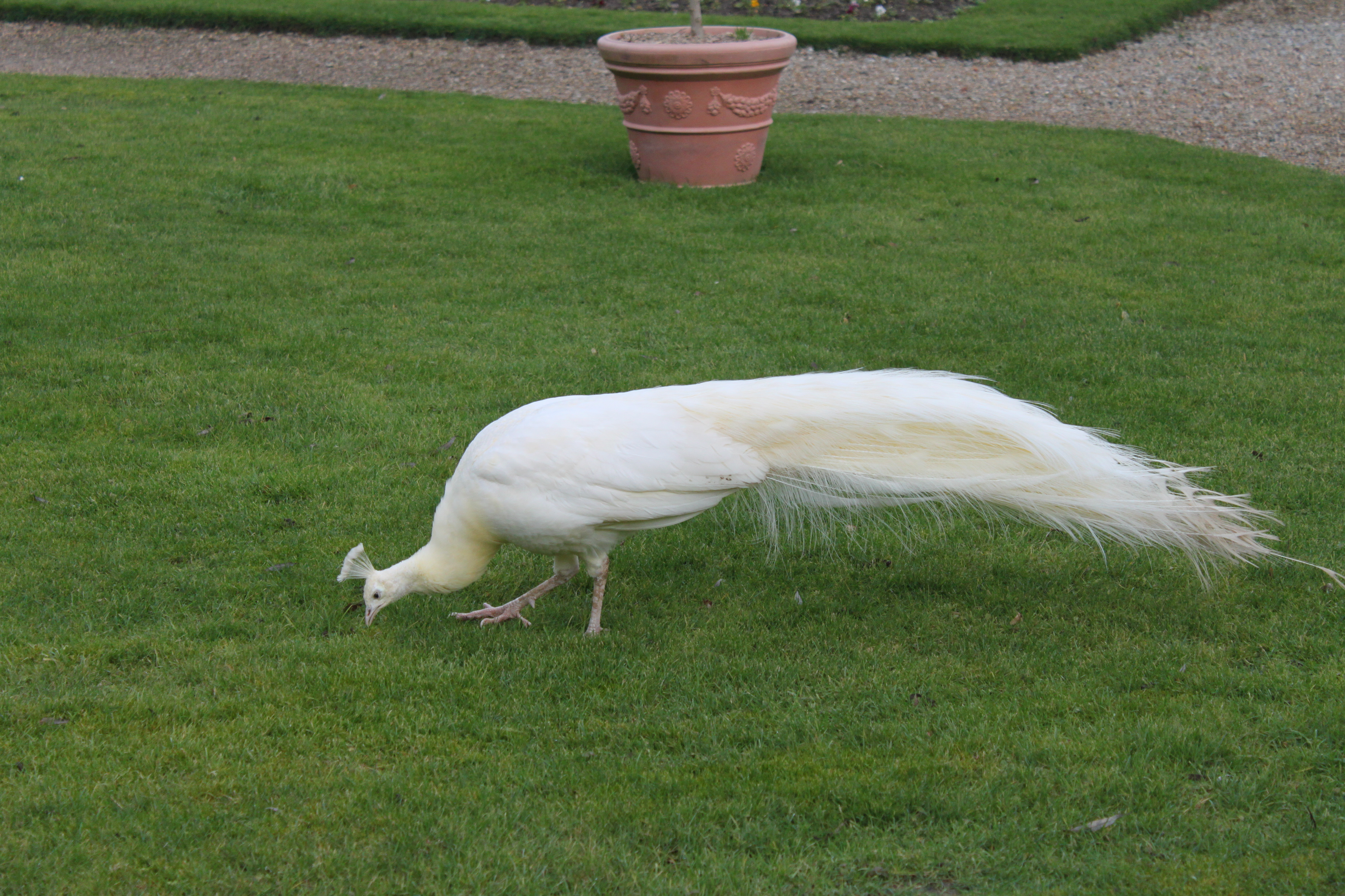 Paon Blanc